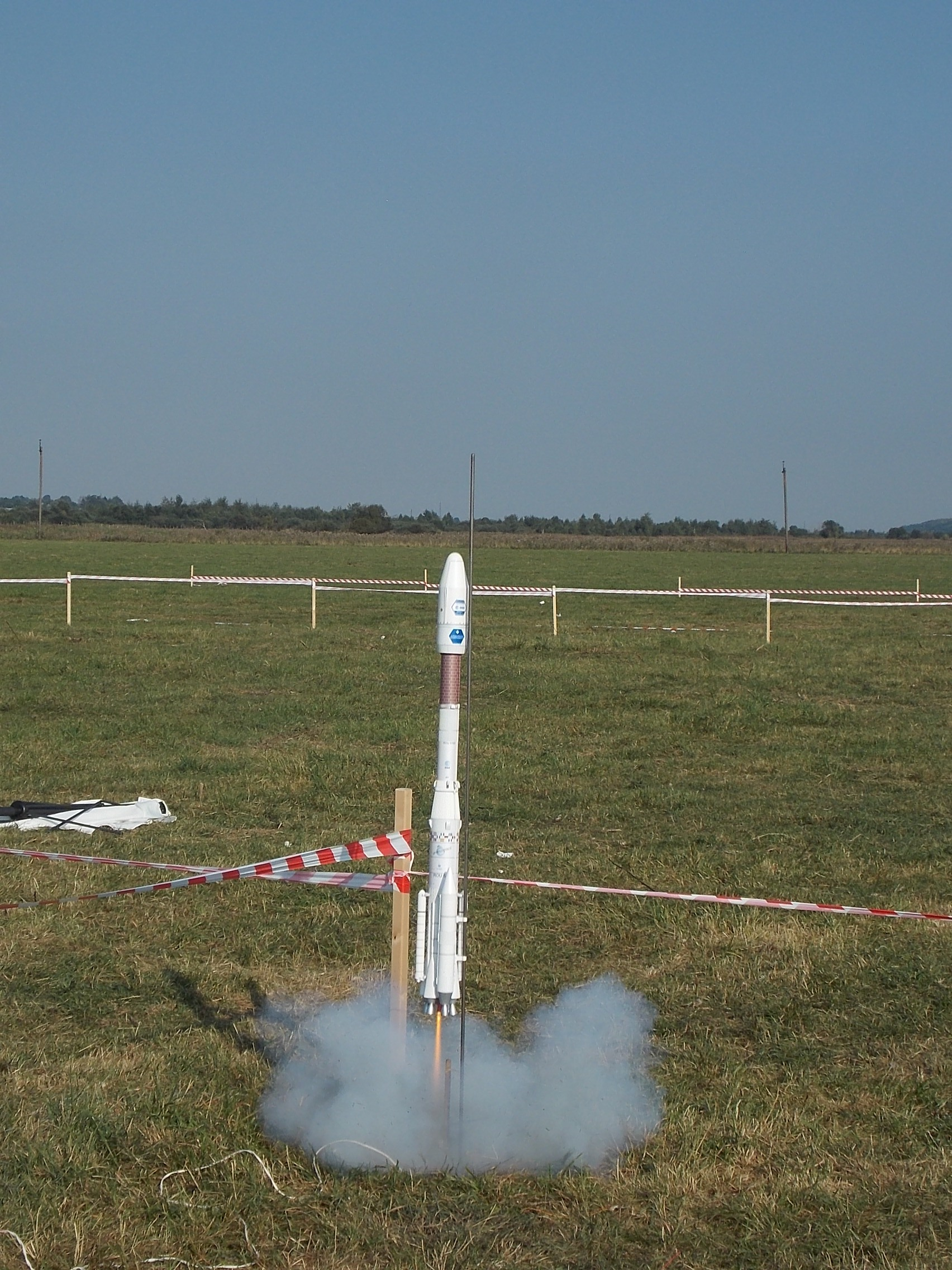 Старт моделі-копії на реалізм польоту Ariane 4 (класу S7).Чемпіонат європи з ракетомодельного спорту 2015, м.Львів